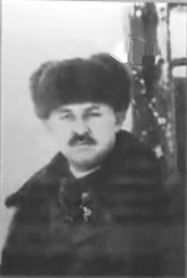 热合木江·沙比尔阿吉，三区革命时期东突共和国临时政府委员兼民政厅副厅长。